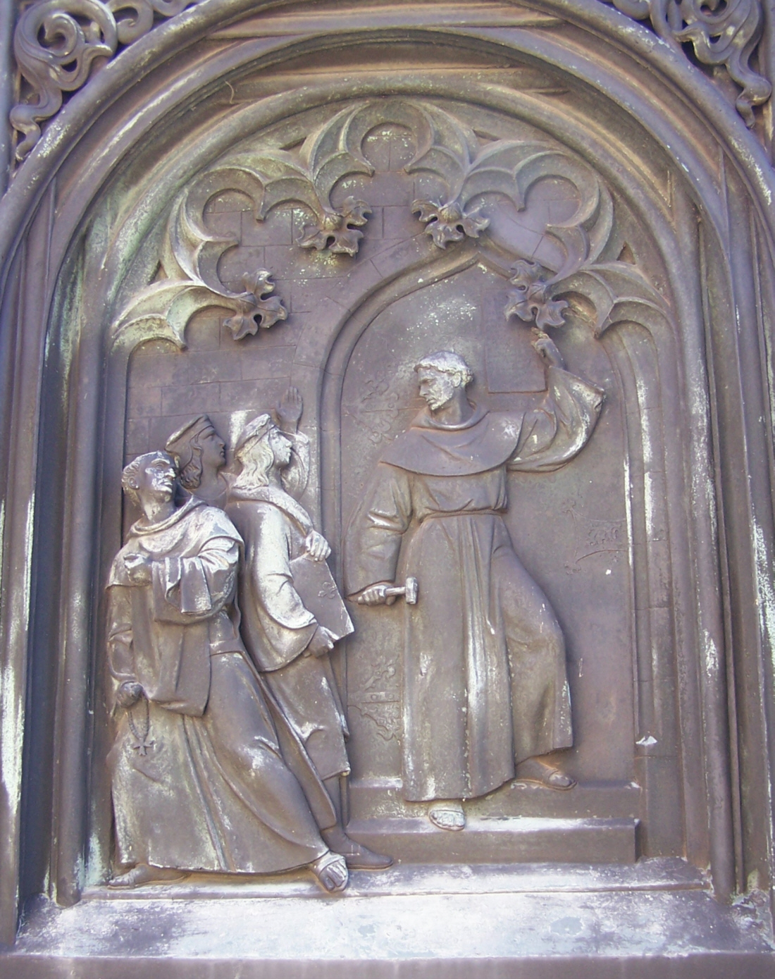 Motivplatte: Der Thesenanschlag in Wittenberg am Lutherdenkmal Möhra.